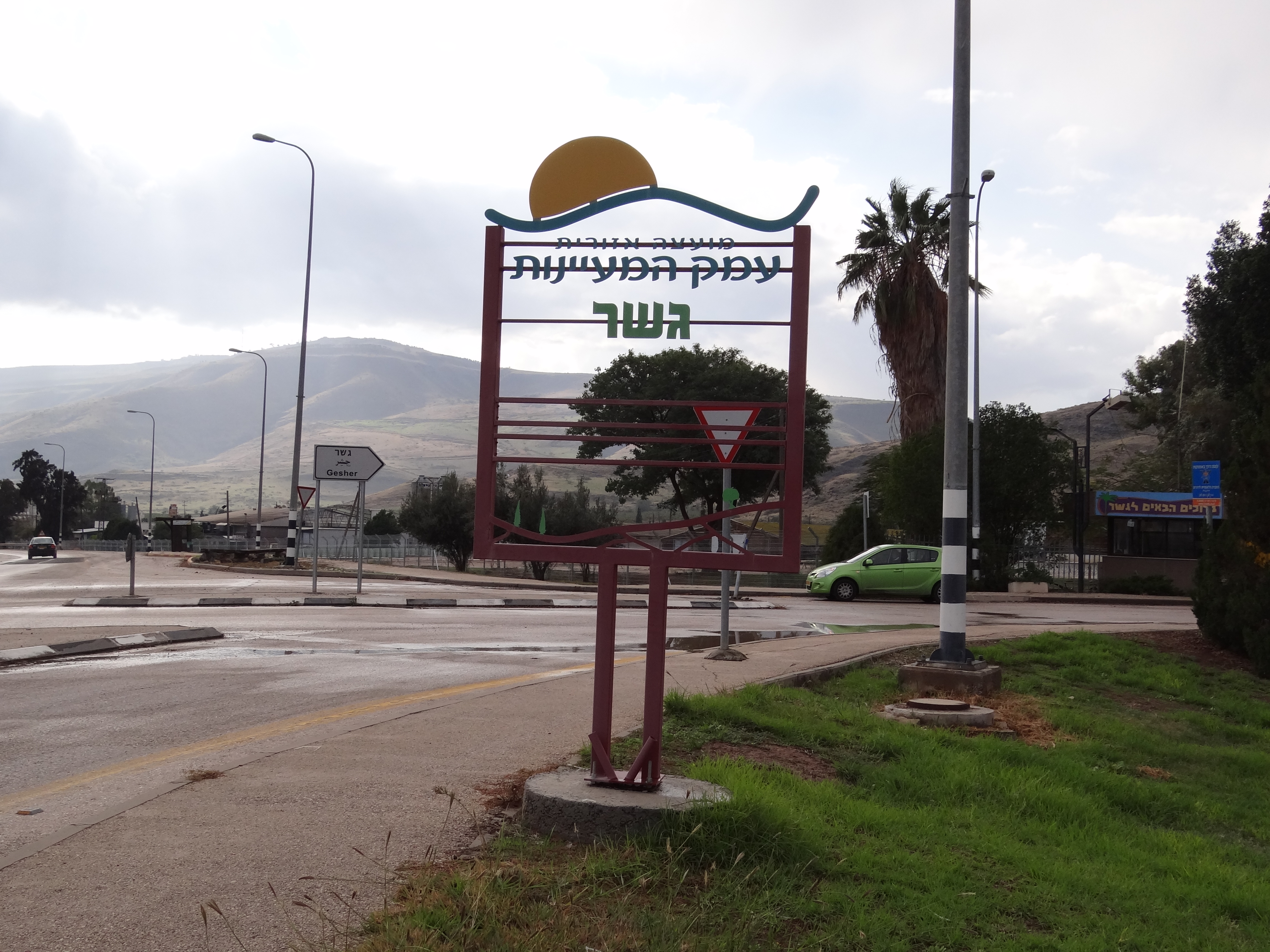 Gesher is a kibbutz in the Beit She'an Valley in northeastern Israel. Founded in 1939 by immigrants from Germany. גשר הוא קיבוץ השייך לתנועה הקיבוצית (תק"ם). מיקומו בעמק הירדן, מדרום לכנרת כ-10 ק"מ דרומית לצומת צמח, סמוך לכביש 90 (כביש הבקעה). הקיבוץ נקרא על שמו של גשר נהריים הסמוך לו.